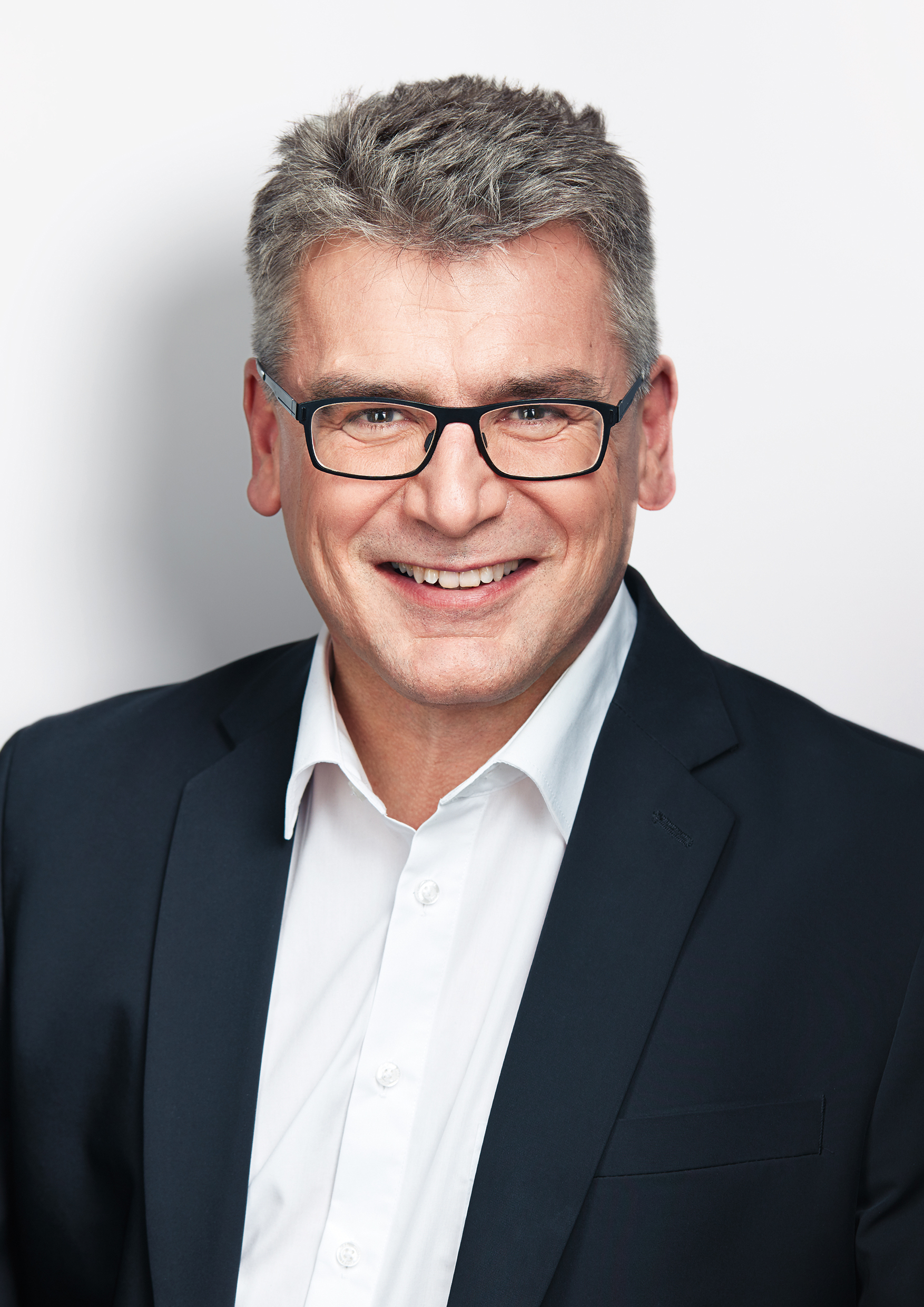 Christian Petry, MdB (2017)